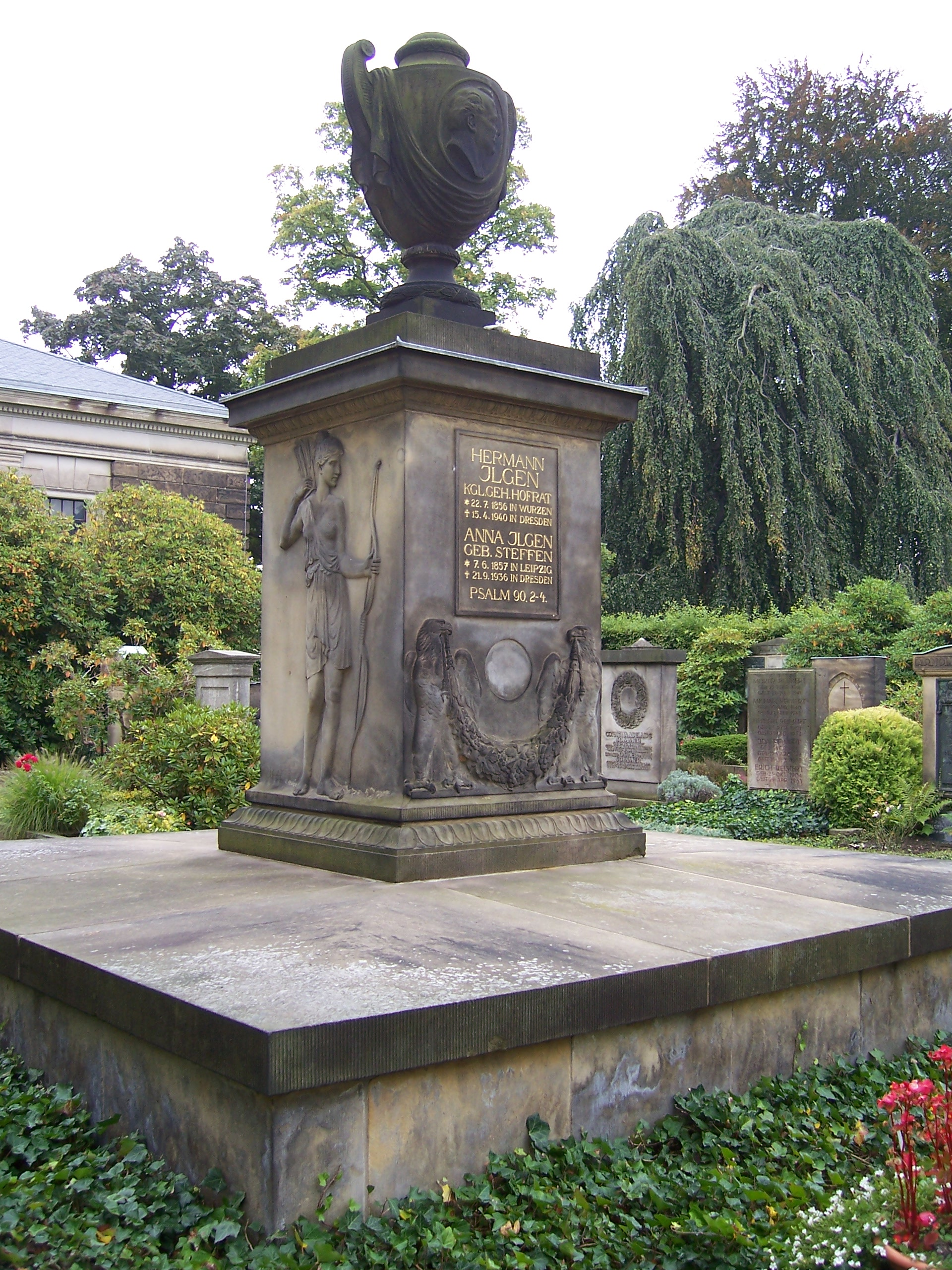 Grab des deutschen Unternehmers Hermann Ilgen auf dem Johannisfriedhof in Dresden.